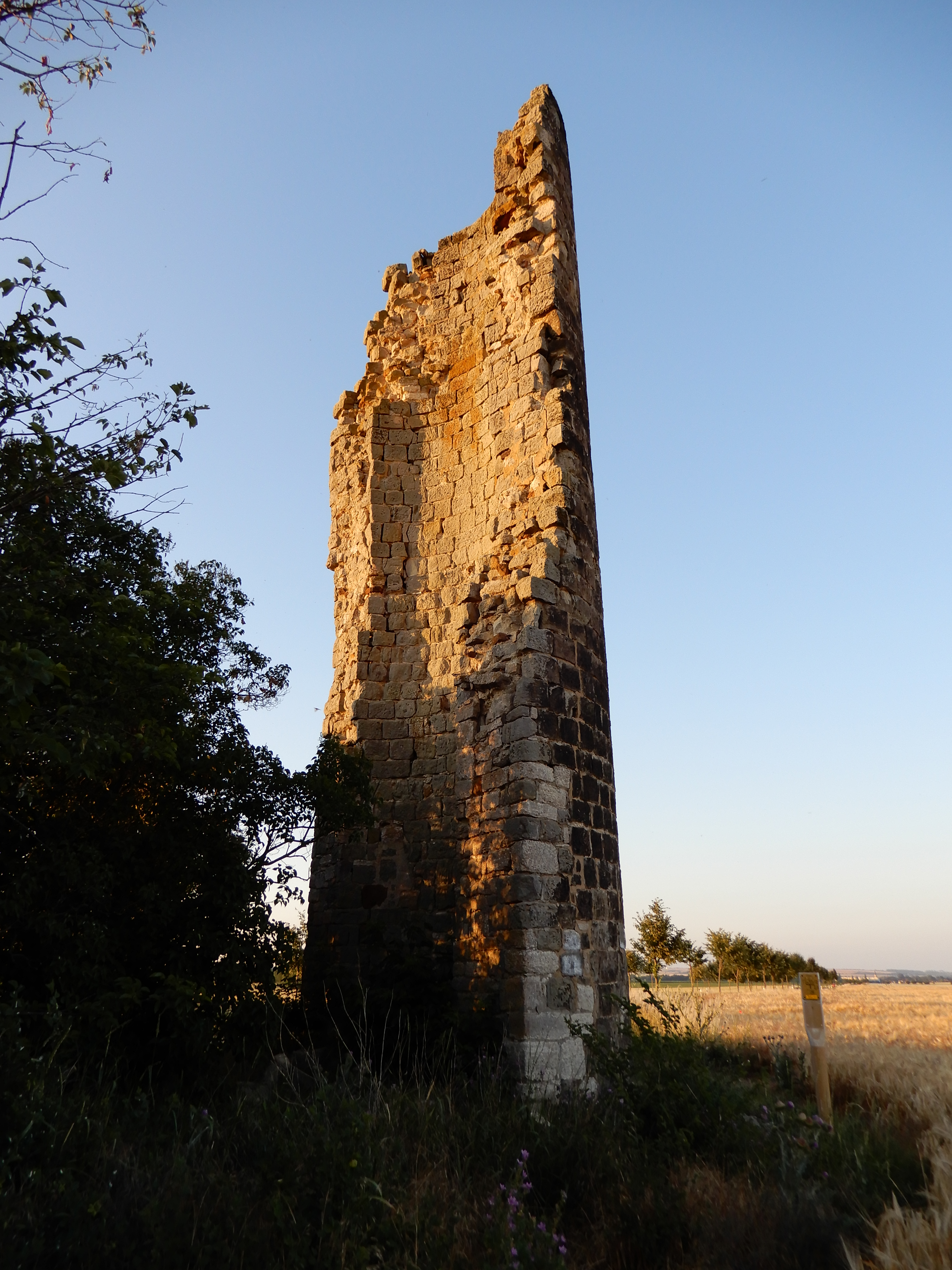 Gaterslebener Warte